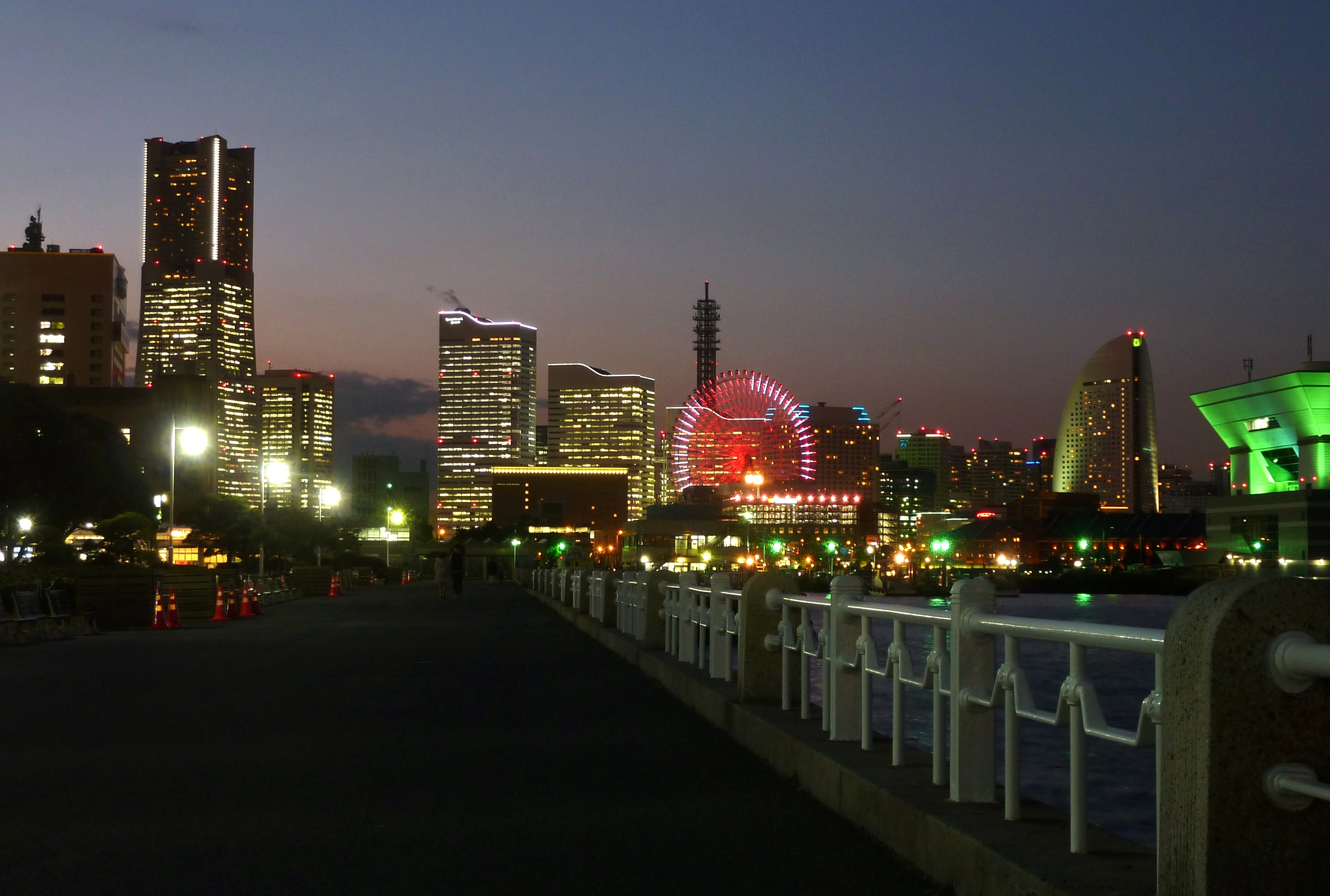 山下公園より望むみなとみらい21（神奈川県横浜市）